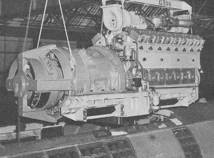 Diesel-elektrisches Traktionsaggregat beim Einbau in den Maschinenwagen eines RAm TEE: Werkspoor Motor RUHB 1616